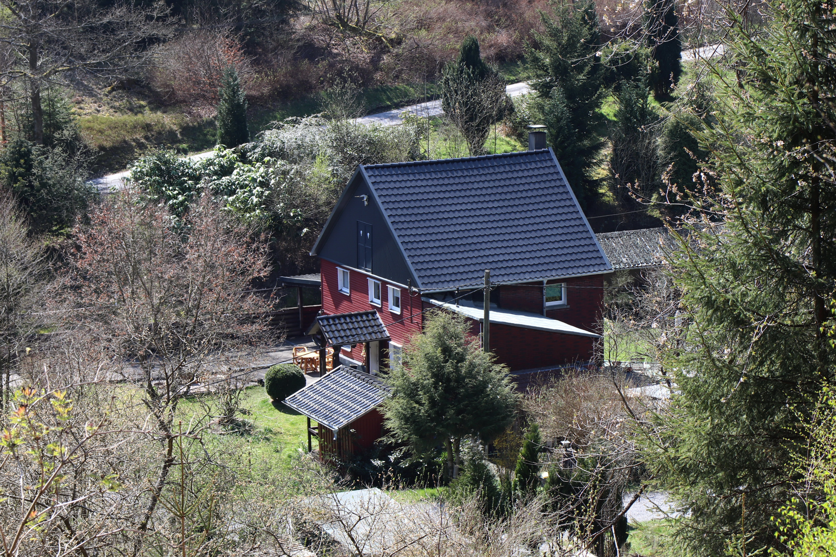 Ehemaliges Schulgebäude in Hemer-Ispei.